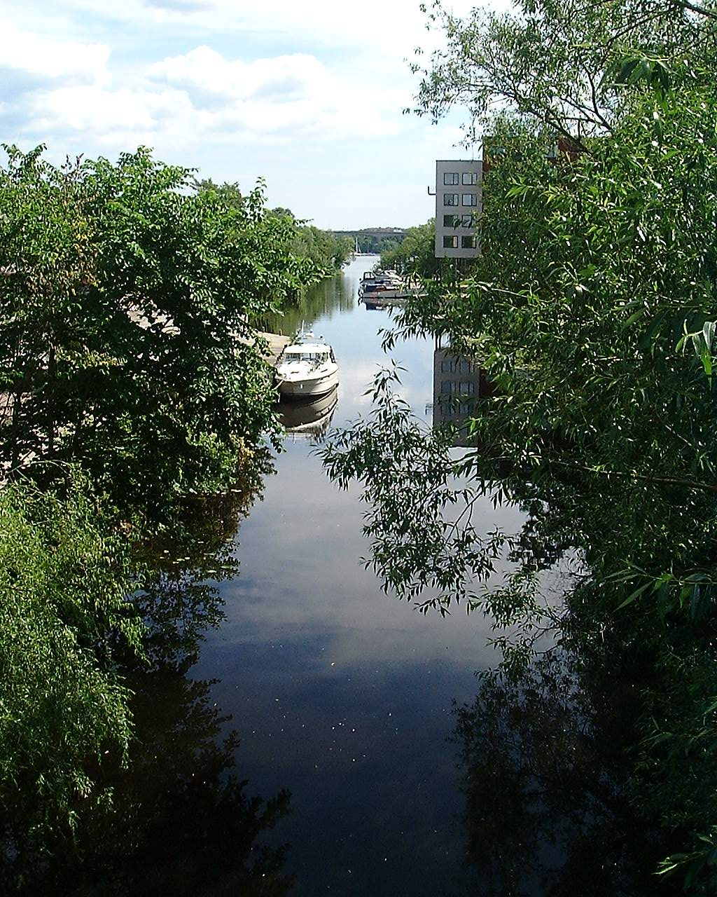 Bällstaviken, the mouth of Bällstaån. Stockholm / Sundbyberg, Sweden